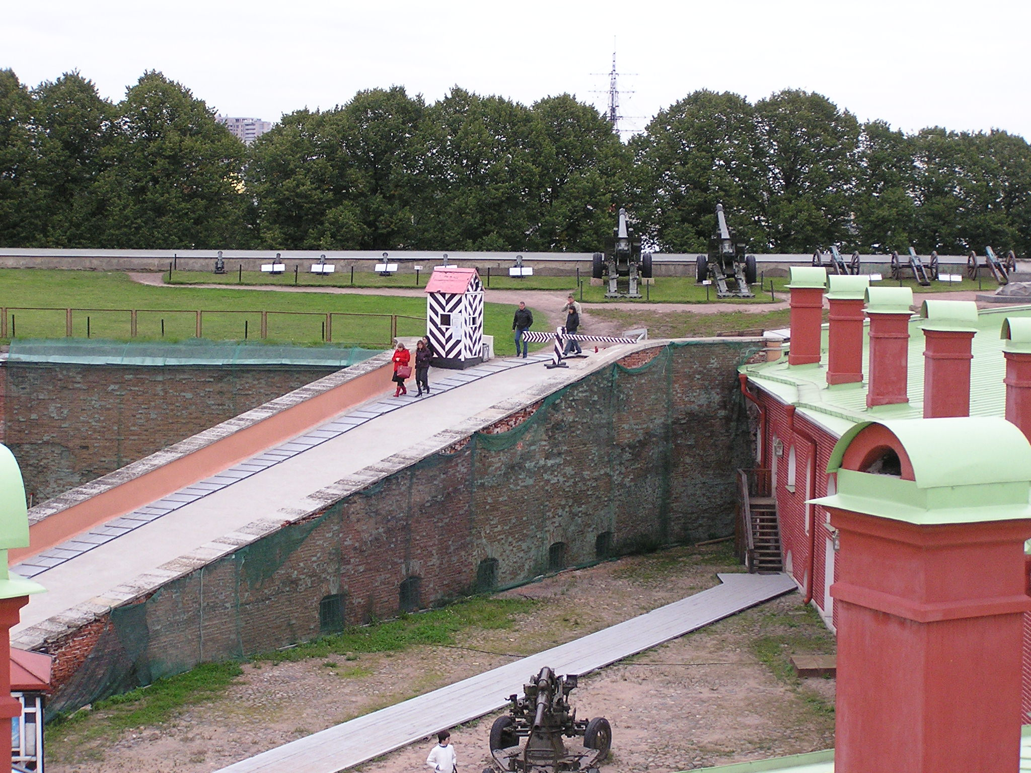 Санкт-Петербург. Петропавловская крепость. Подъем на Государев бастион